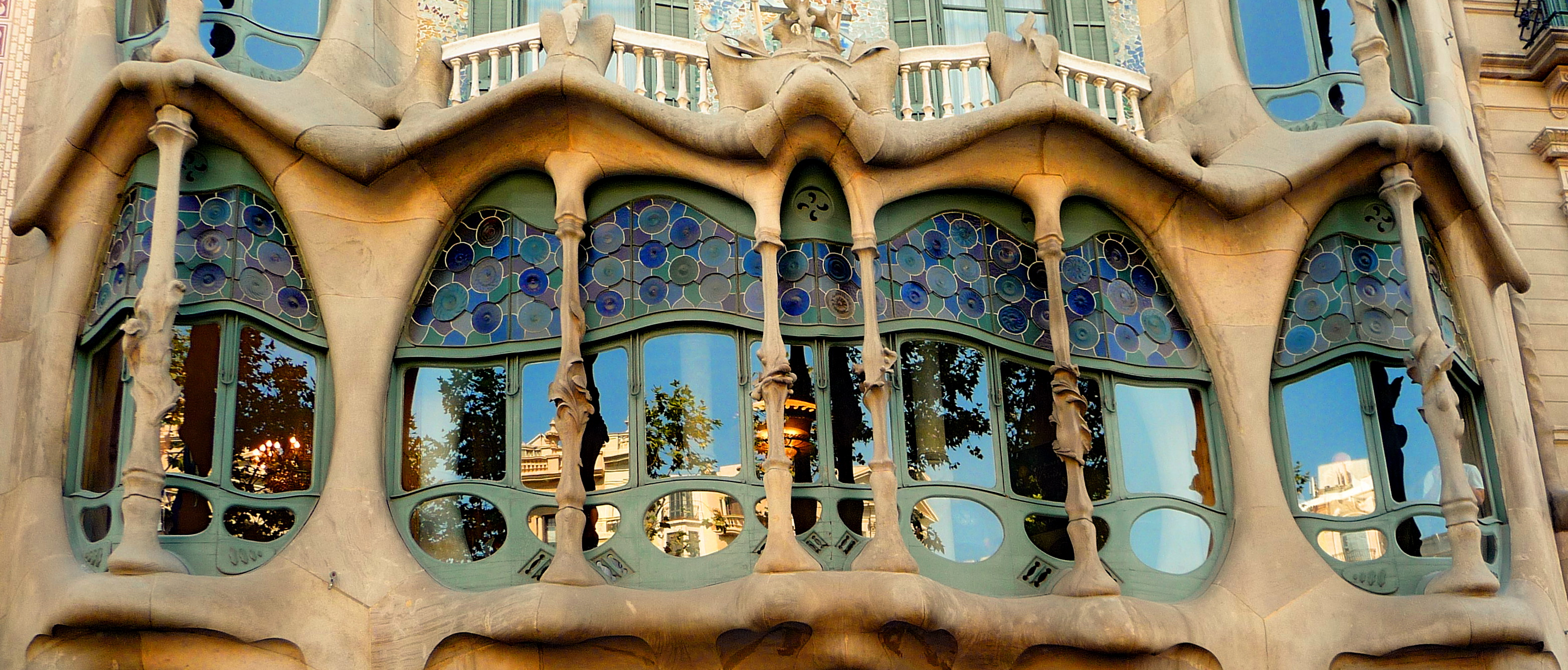 Finestral del pis principal de la casa Batlló, obra d'Antoni Gaudí (1907)